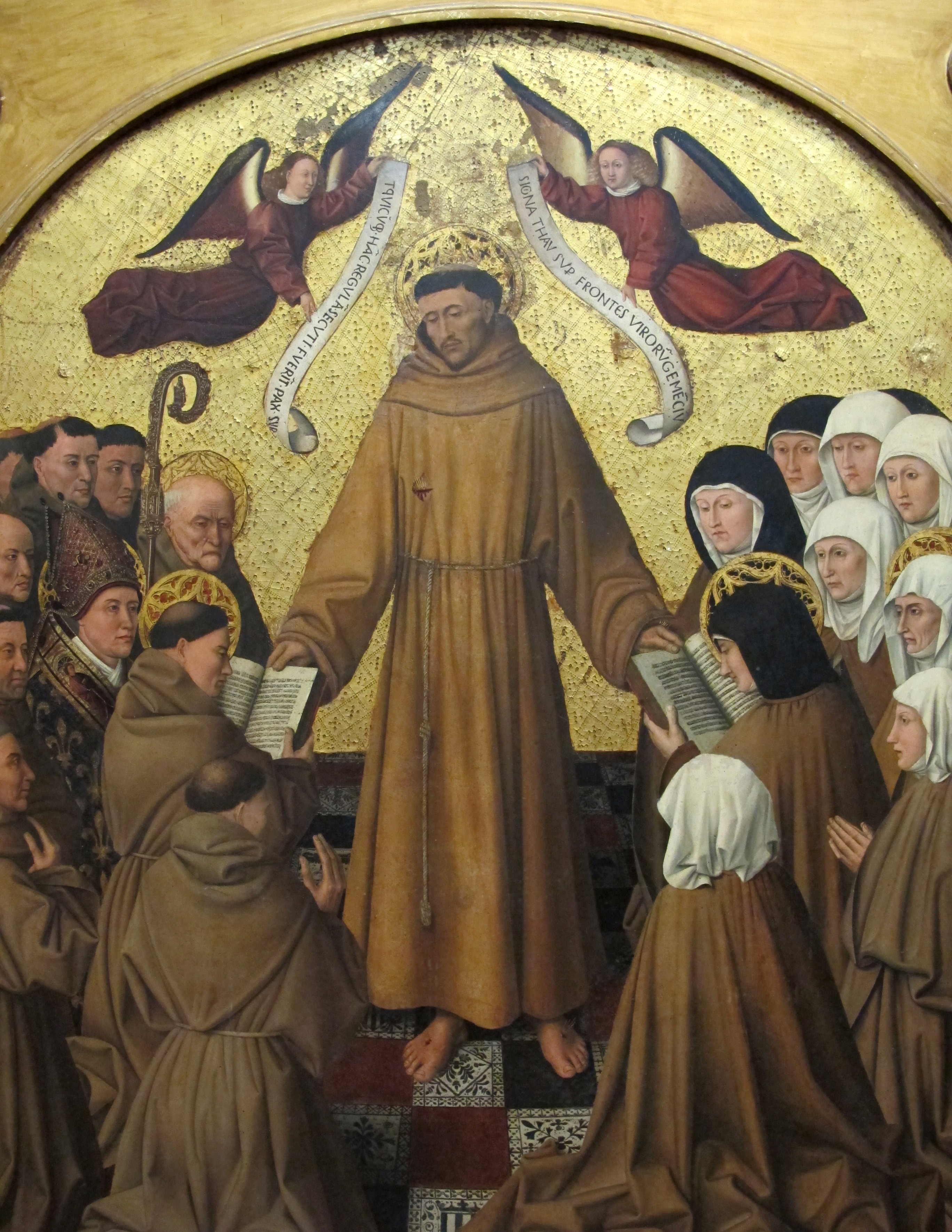 Galleria Napoletana (Museo di Capodimonte)